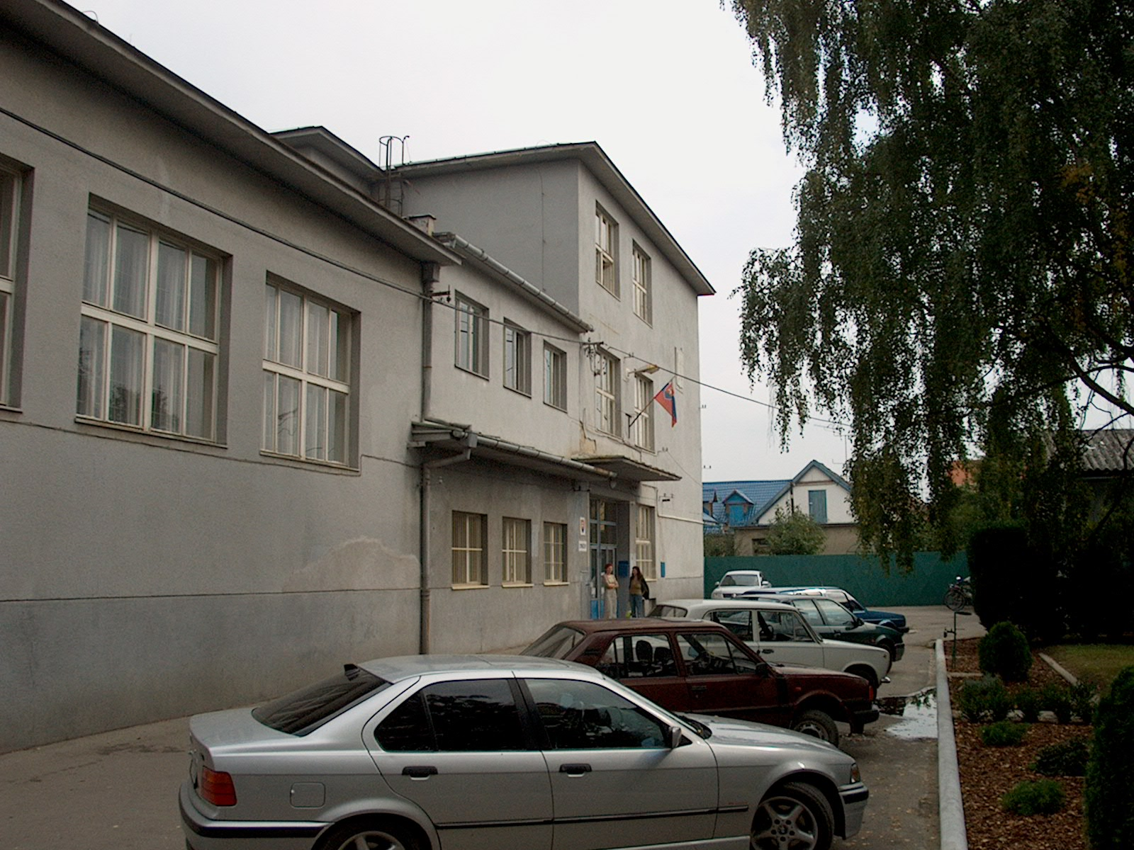 Gymnázium na Komenského ulici, Hlohovec, Slovensko